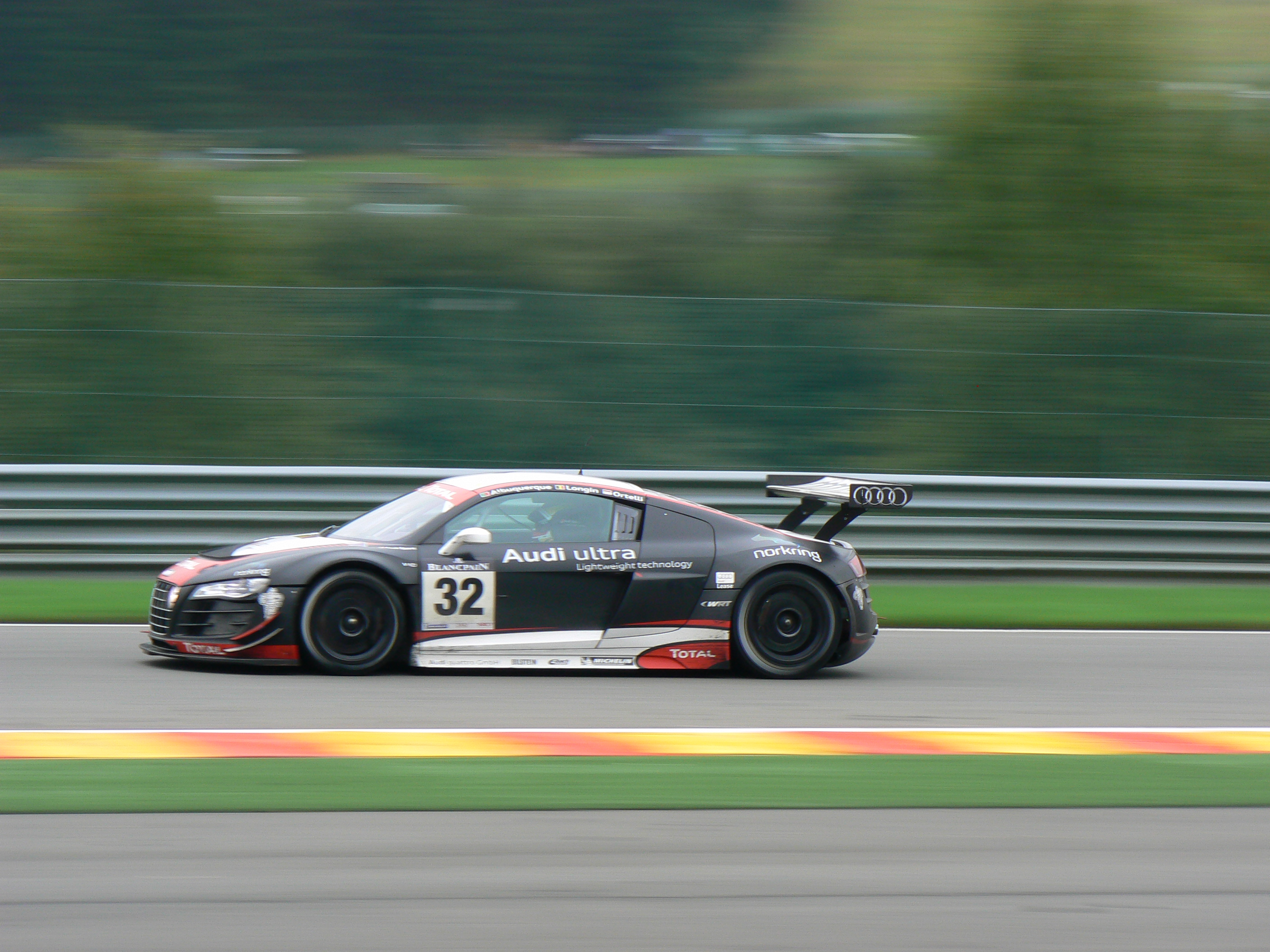 24 Heures de Francorchamps, équipage Filipe Albuquerqe / Bert Longin / Stephane Ortelli, 6ème classement général